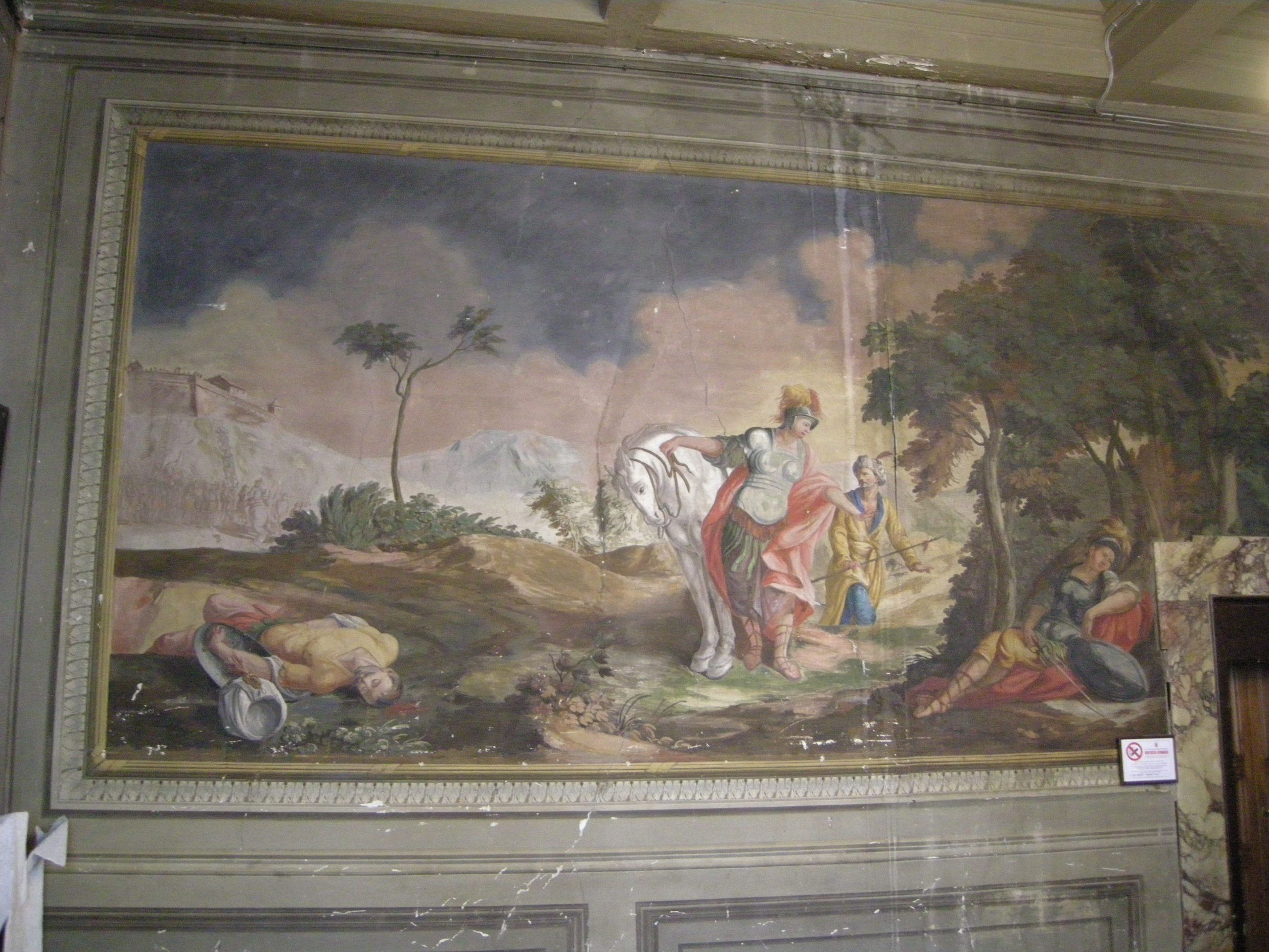 Palazzo panciatichi, sala della gerusalemme liberata